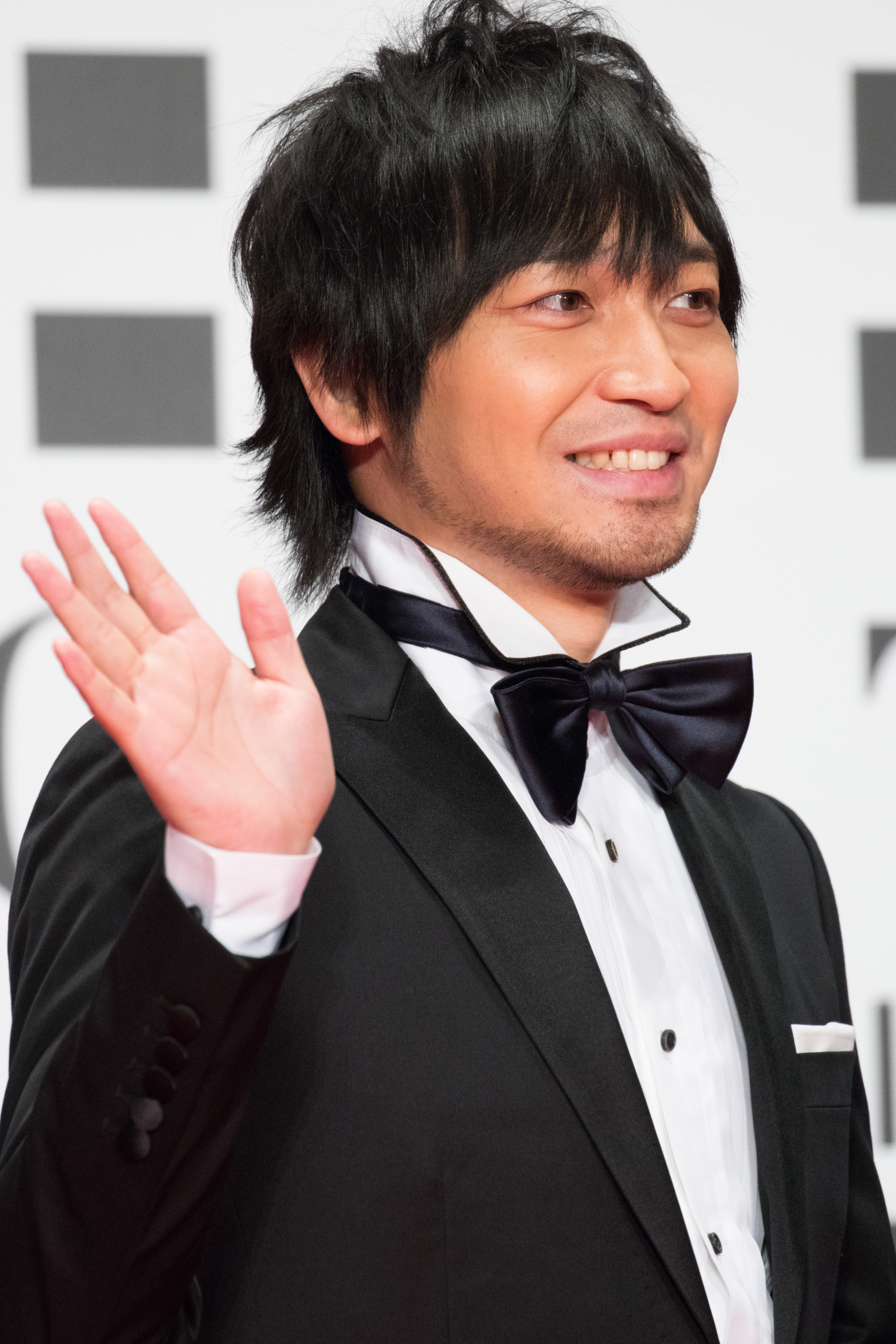 第29回 東京国際映画祭 オープニングセレモニー 中村悠一 (虐殺器官)